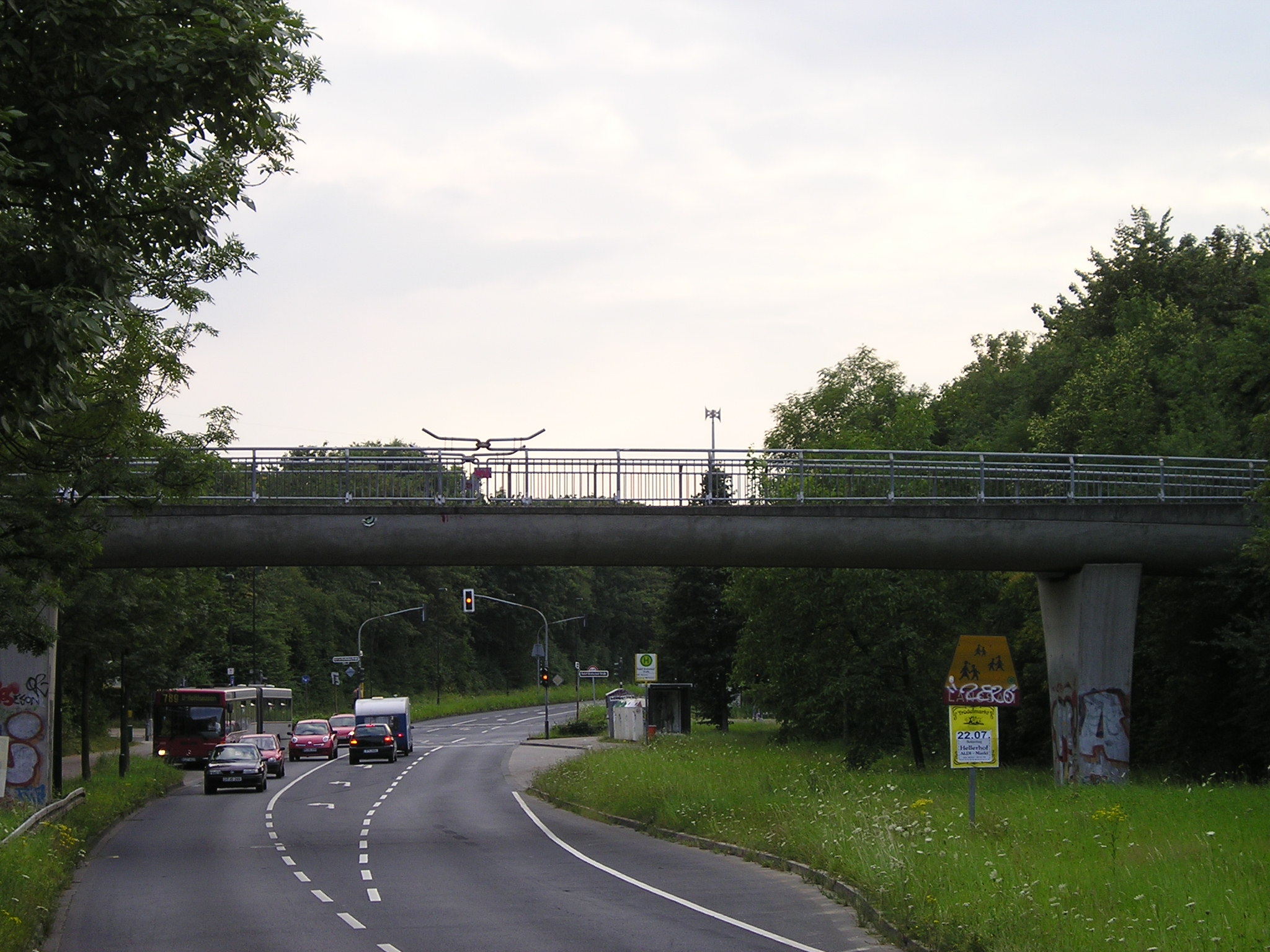 Fußgängerbrücke über den Hellerhofweg an der Bushaltestelle Rudolf-Breitscheid-Straße in Düsseldorf-Hellerhof, die den Tunnel durch die Lärmschutzwand ersetzt hat.